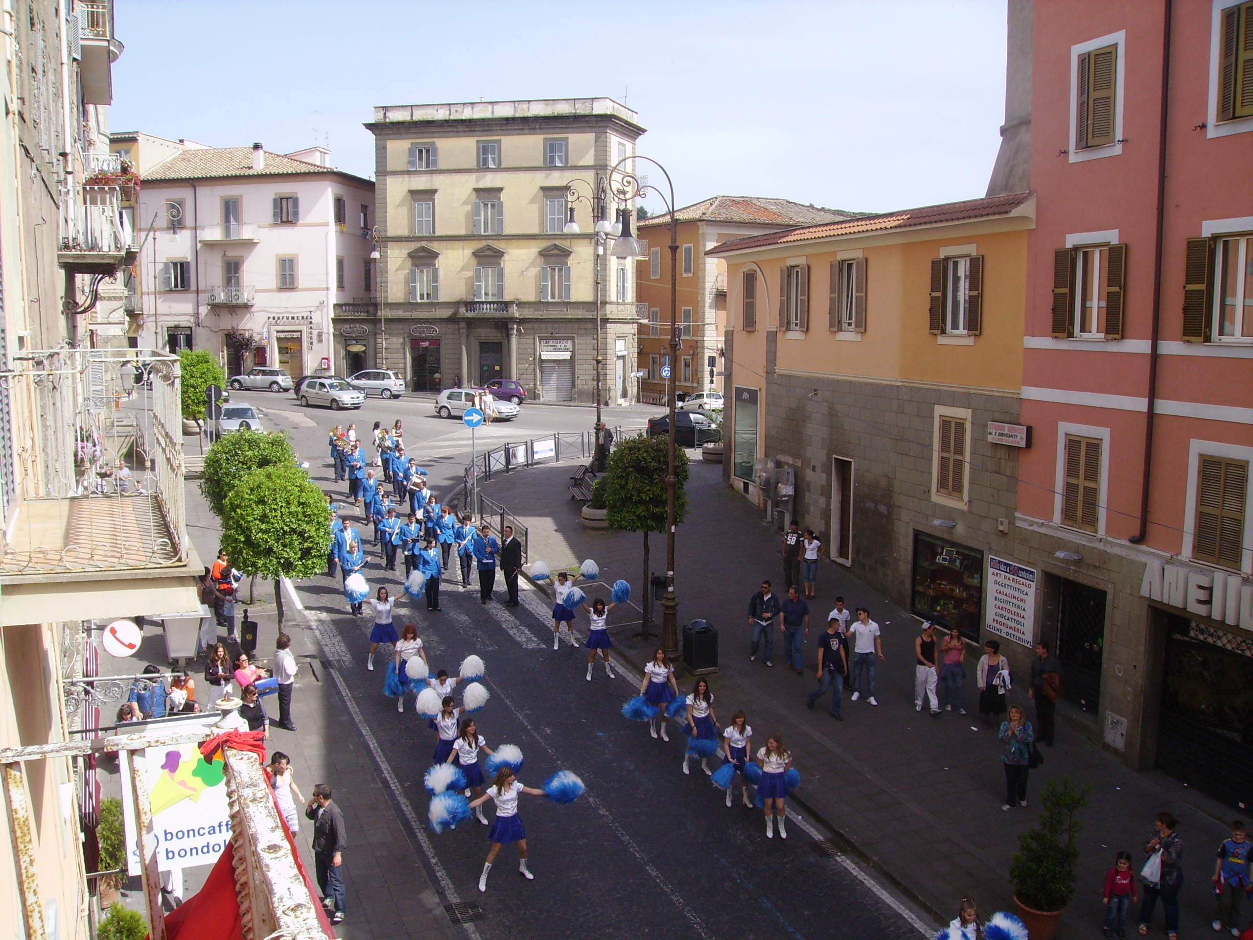 Banda di Marino